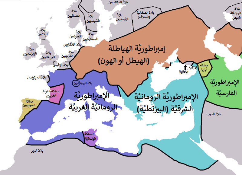 خريطة أوروبَّا سنة 450م.